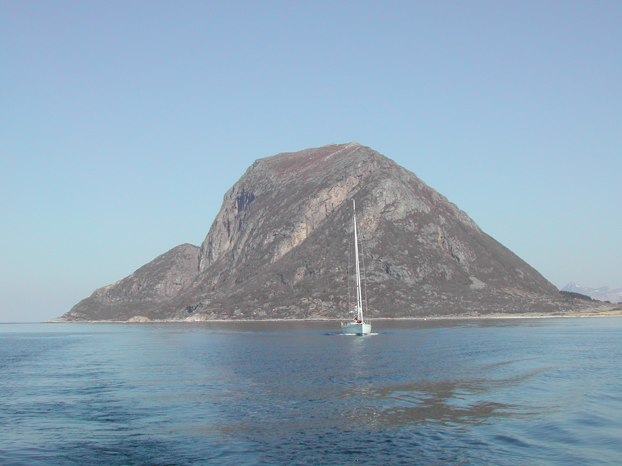 Sailboat passed Kunna